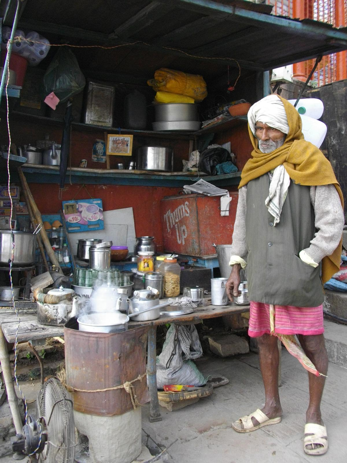 チャイ屋 1杯 Rs.3（6円）